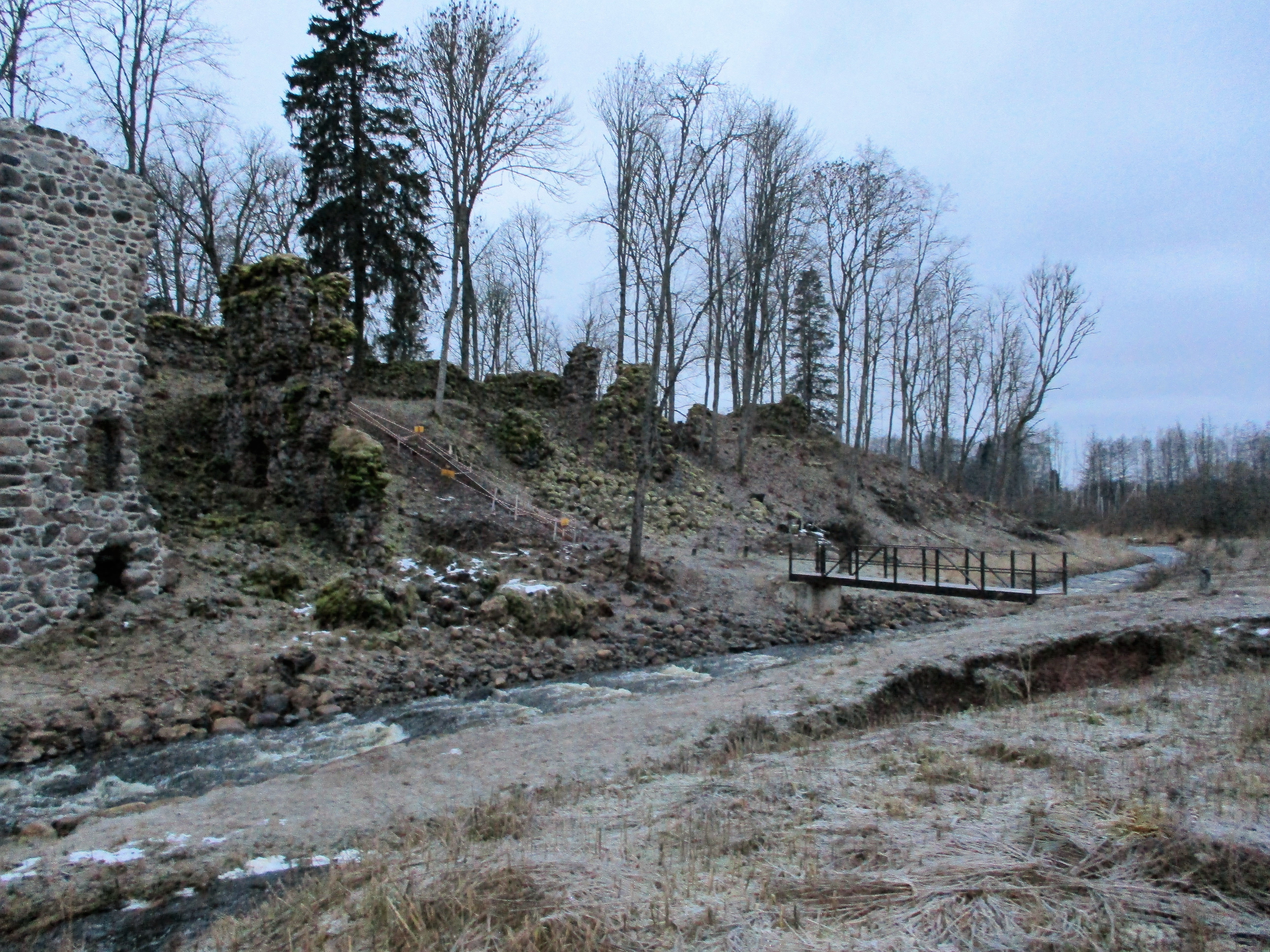 Vaade kirdest pealinnuse danskerile ja põhjapoolse hoonetiiva varemetele ning Tarvastu jõele. Asub u. 1,2 km Tarvastu luteri kirikust kirdes Tarvastu jõe ääres vanal kõrgel jõesaarel. Linnuse juurde pääseb keerates kirikust põhja pool Väluste peale ja seal esimesest teeristist paremale